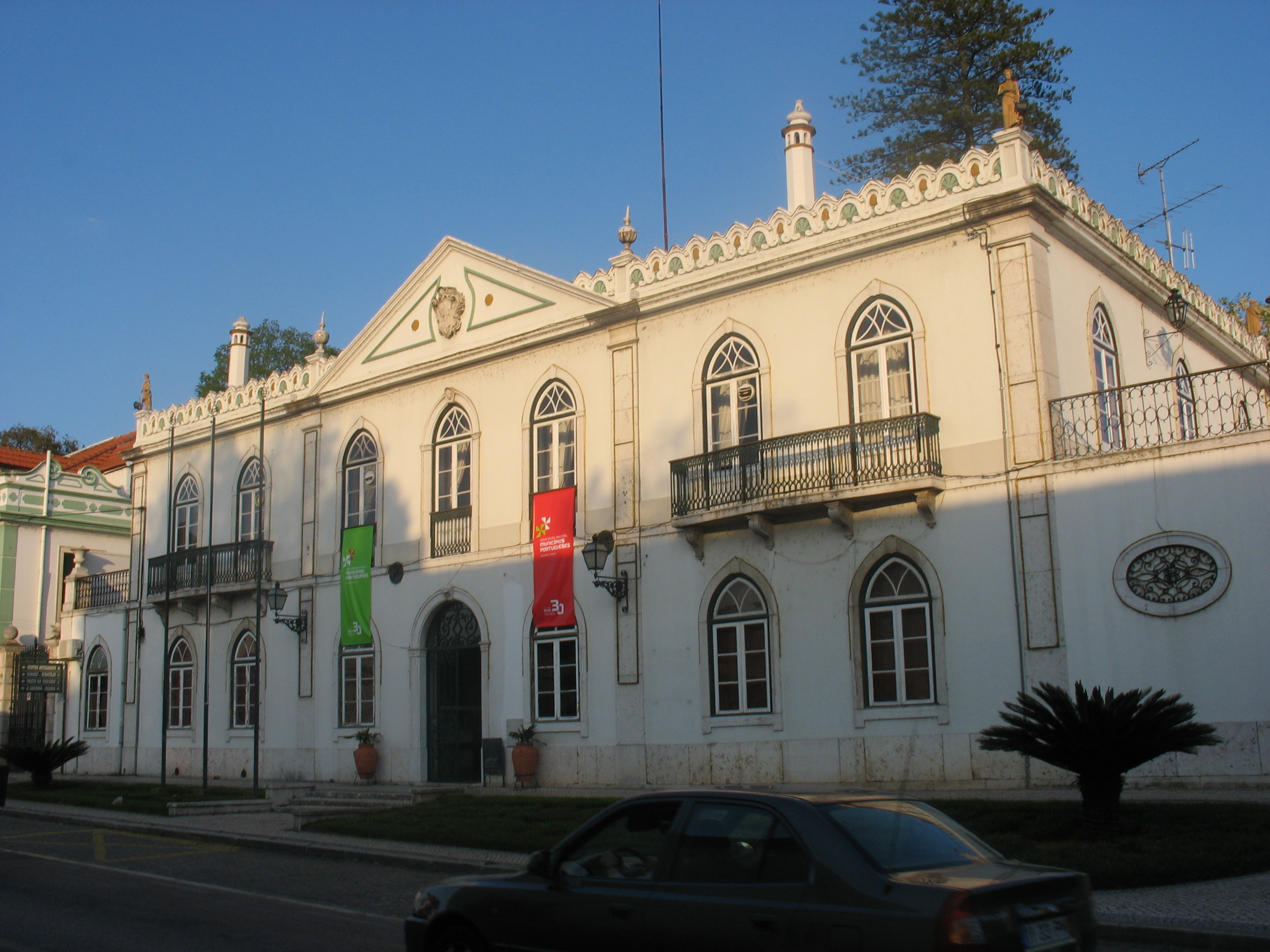 Chamusca (Portugal) - Paços do Concelho /Town Hall